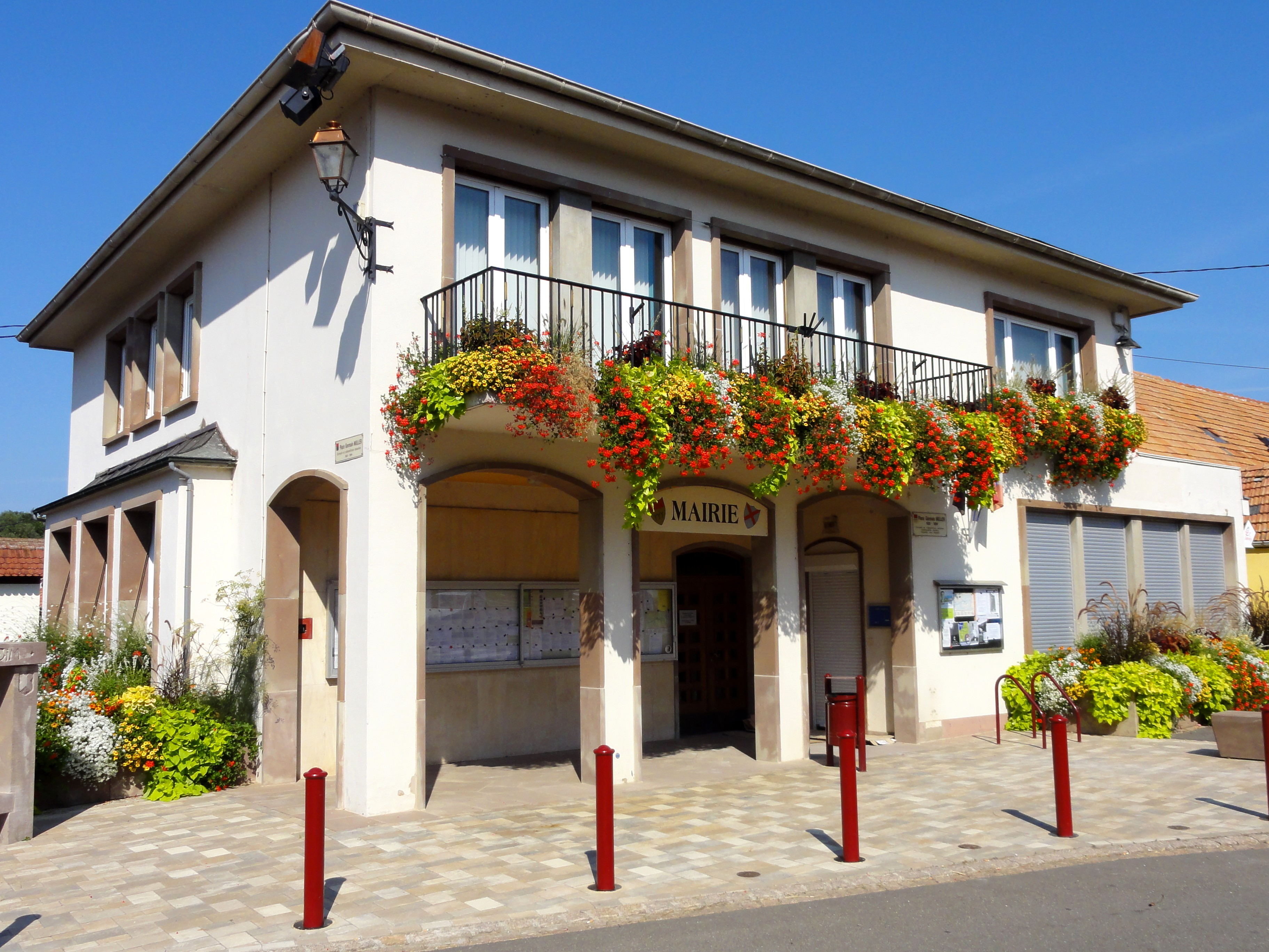 Alsace, Bas-Rhin, Stutzheim, Mairie.